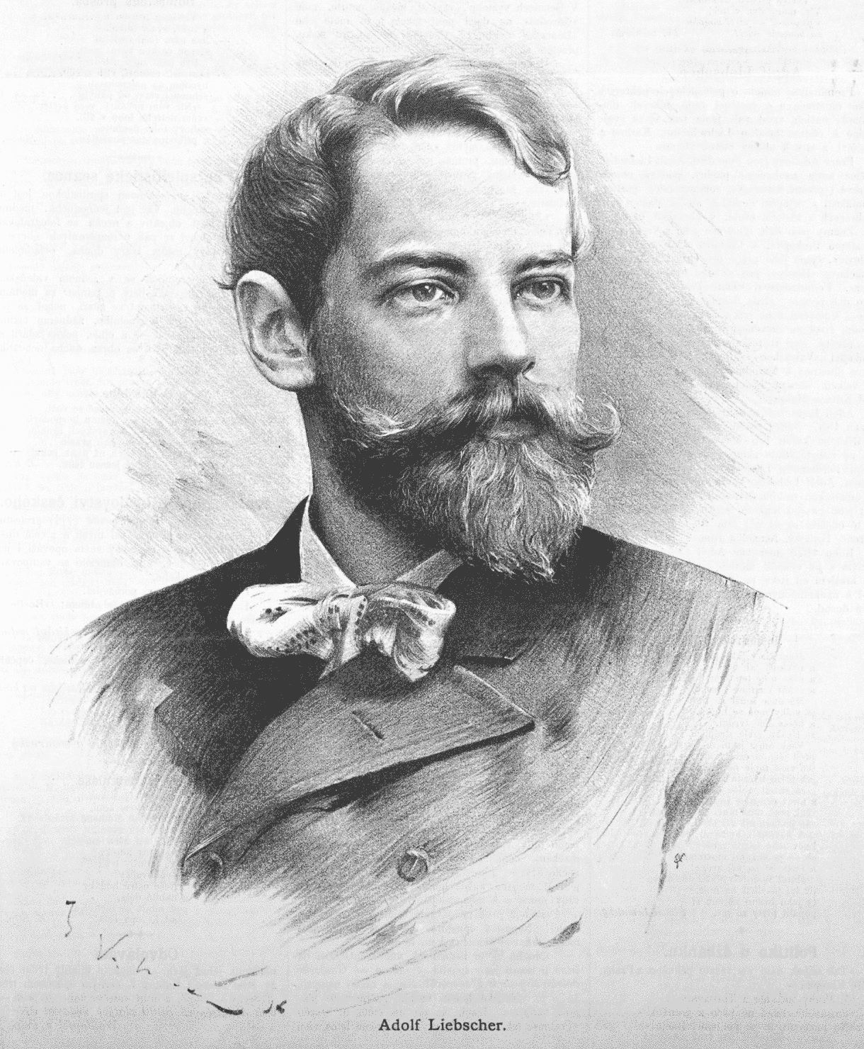 Portrait of Adolf Liebscher (1857 - 1919), Czech painter.